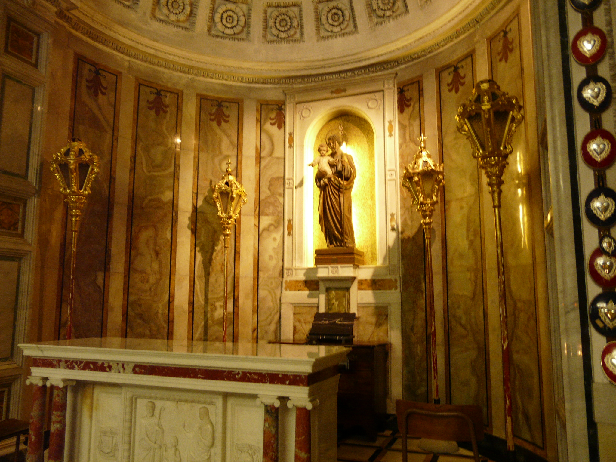 Cappella di San Giuseppe, Santuario di Nostra Signora di Montallegro, Rapallo, Liguria, Italia